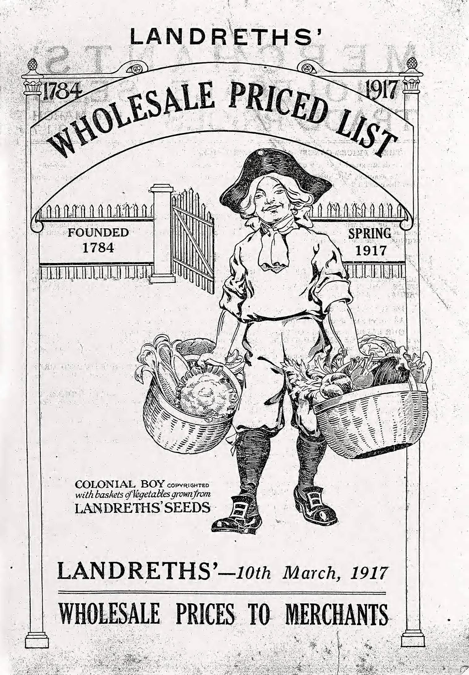 LA N D BETH S